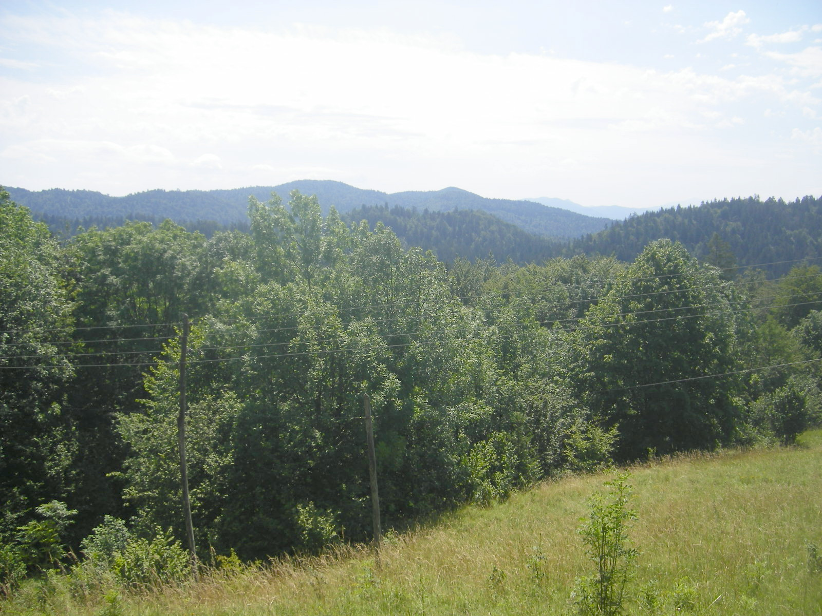 Landscape at Hrušica (Ajdovščina municipality)